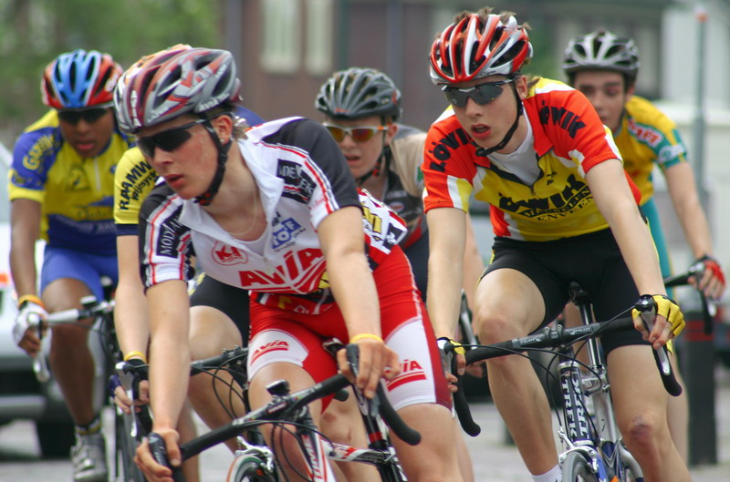 Wegwielrenners tijdens wedstrijd in Eersel en omgeving, N.B. Foto: Jan Weijers, Helmond